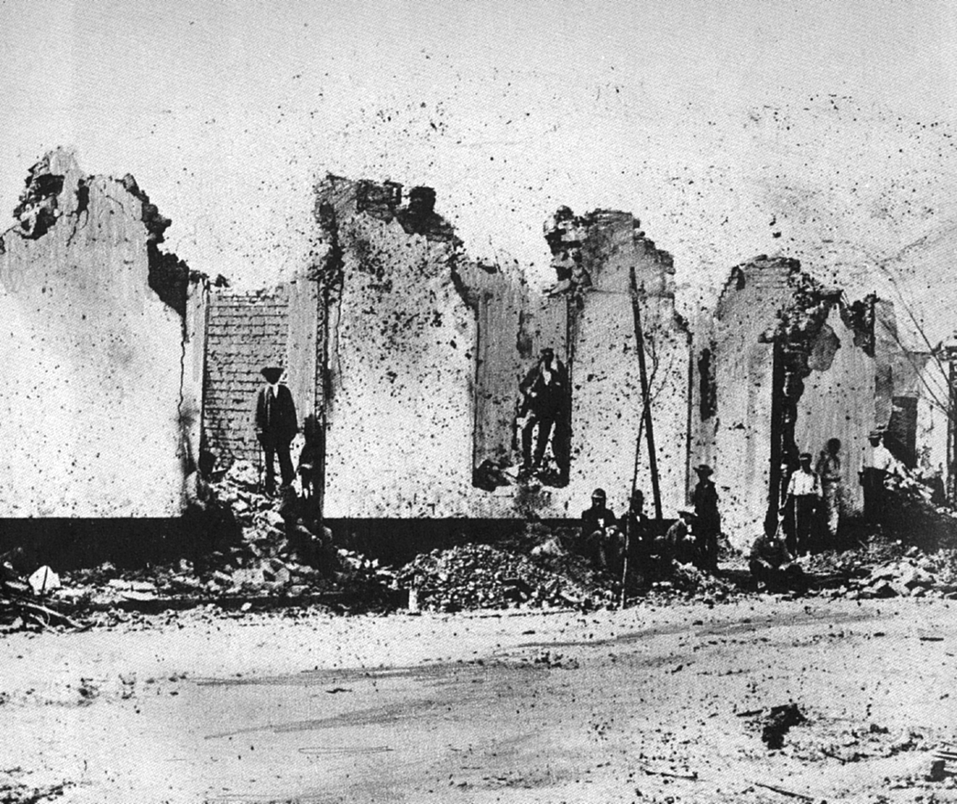 chorrillos pared destruida